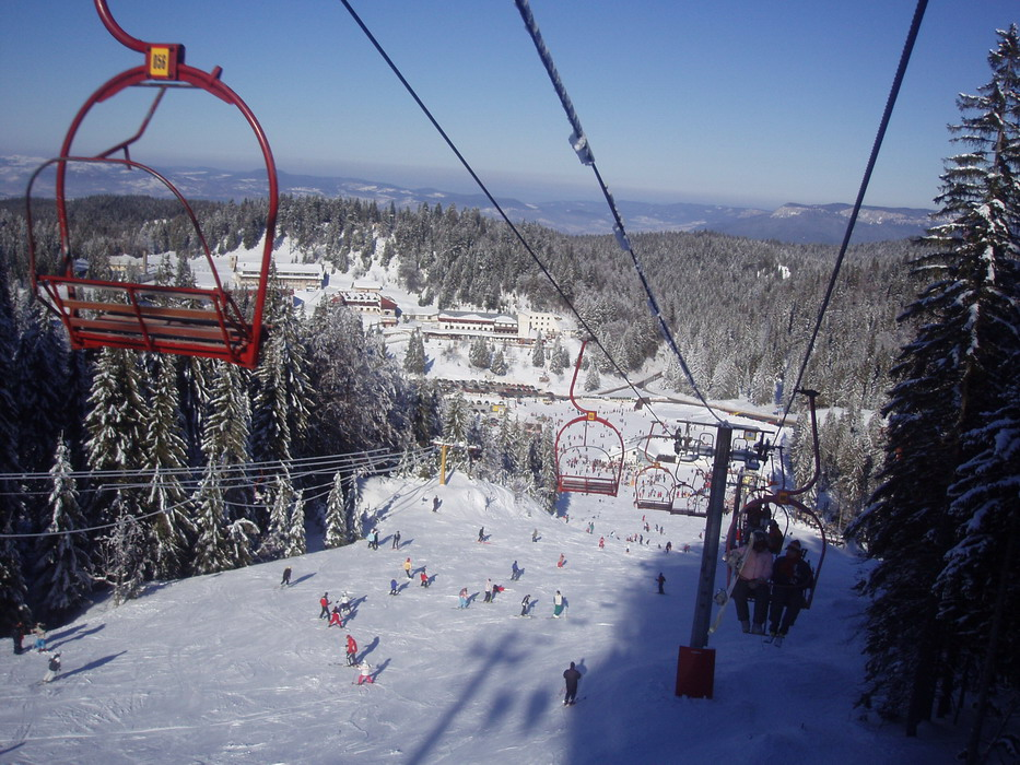 Жичара на Јахорини. Licensing